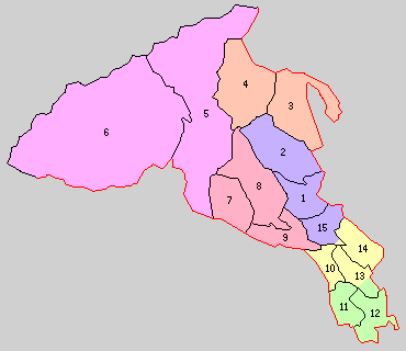 栃木県塩谷郡の町村。